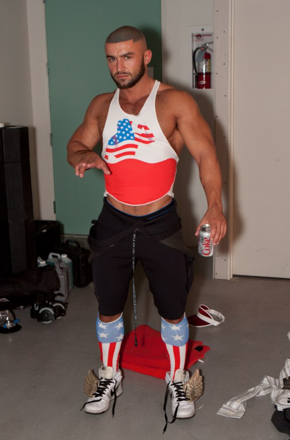 Sagat em teste de vestuário de LA Zombie